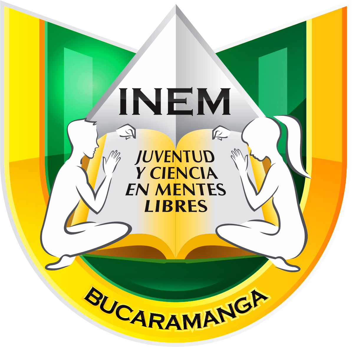 Escudo INEM Custodio Garcia Rovira